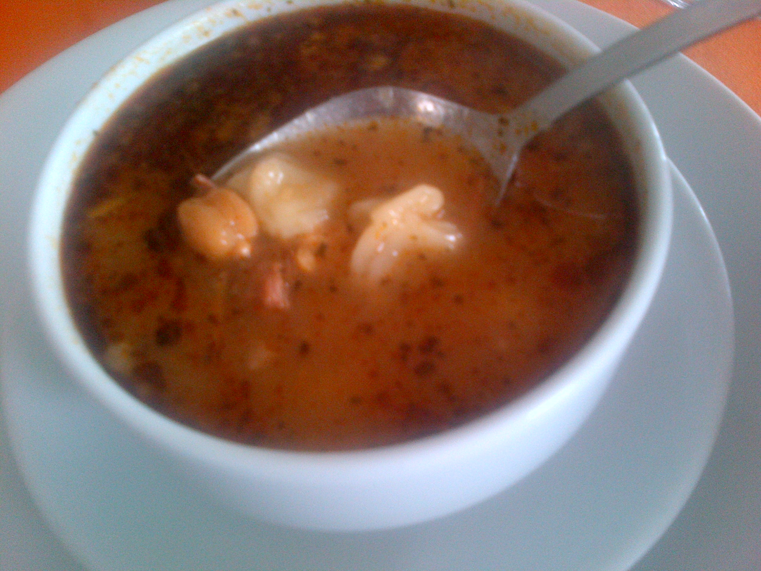 Yüksük çorbası (Sopa de yüksük) se hace con bolas de mantı, garbanzos y salça (pasta doble concentrada de tomate), de la cocina turca.